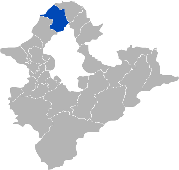 KaurJmeb為編寫中華民國臺灣省臺北縣三芝鄉，於2005年2月6日所繪。